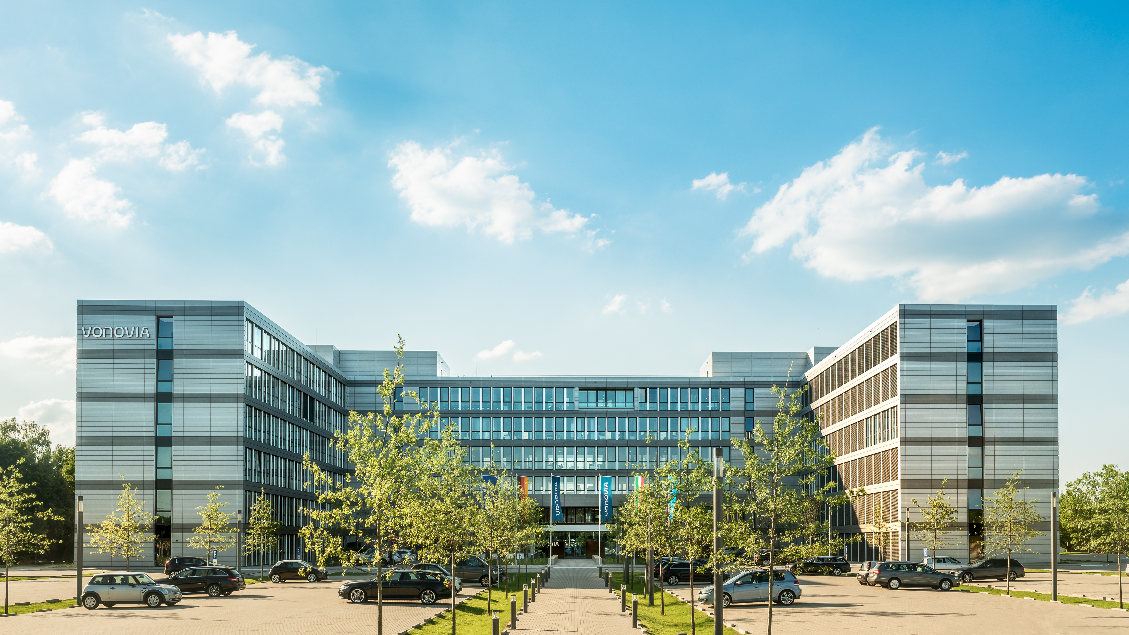 Unternehmenszentrale Vonovia SE